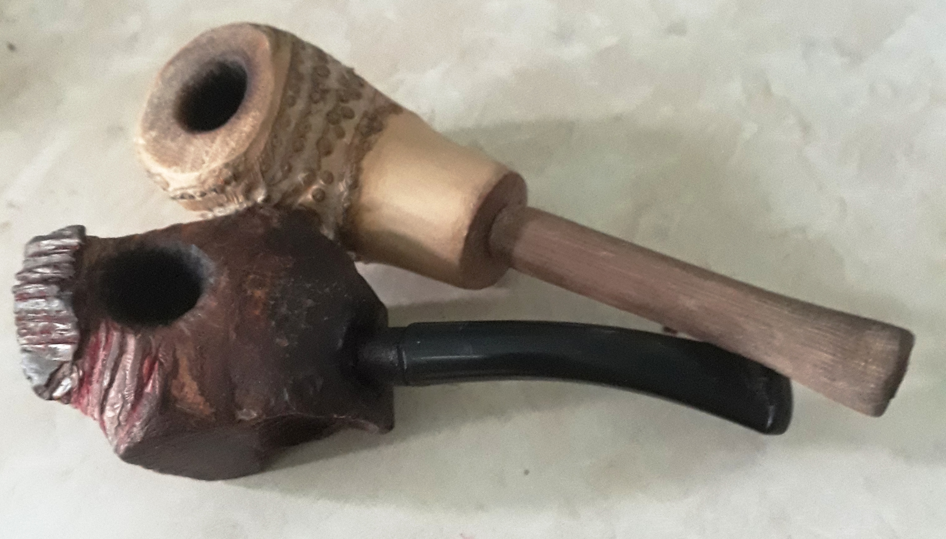 bambou pipes